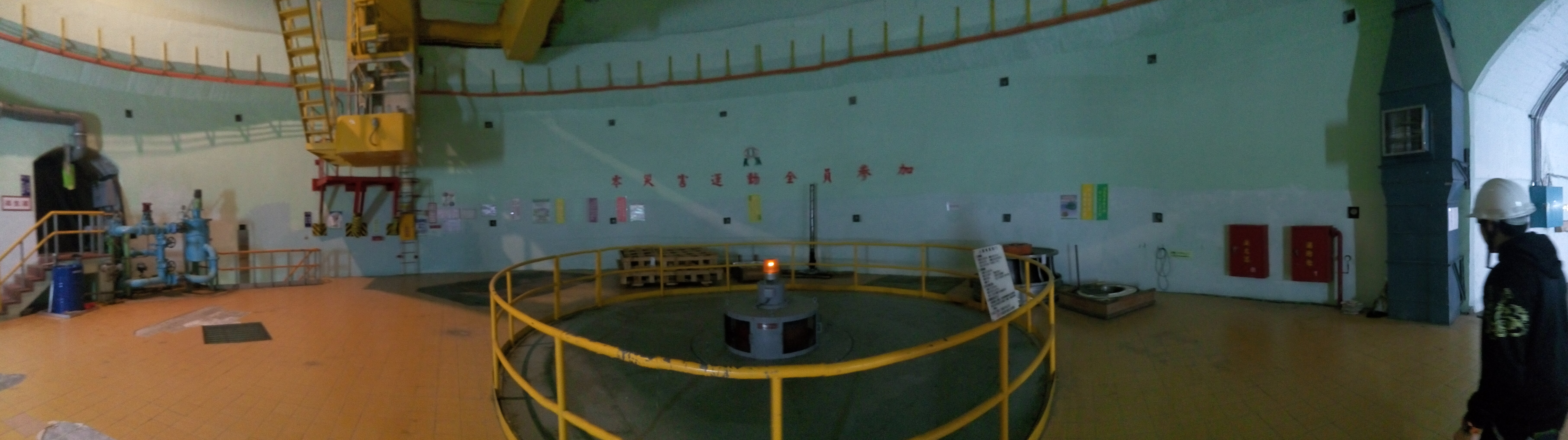 東部發電廠水簾機組廠內全景圖